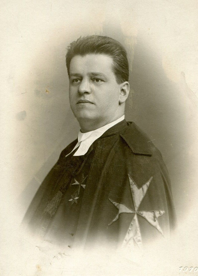 Vlasák Josef ThDr (1867-1958) velmistr Rytířského řádu křížovníků s červenou hvězdou - portrét fot.1910